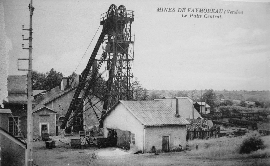 Le puits du Centre du bassin houiller de Faymoreau (Vendée, France).